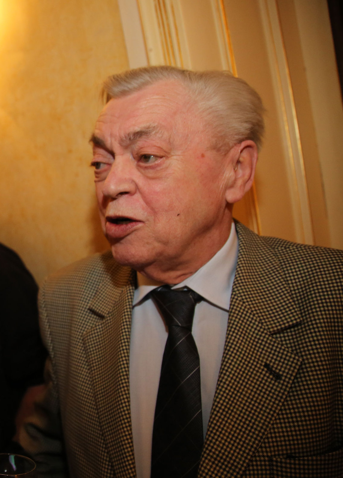 Serafin_harald,Ofczarek_Klaus-9441